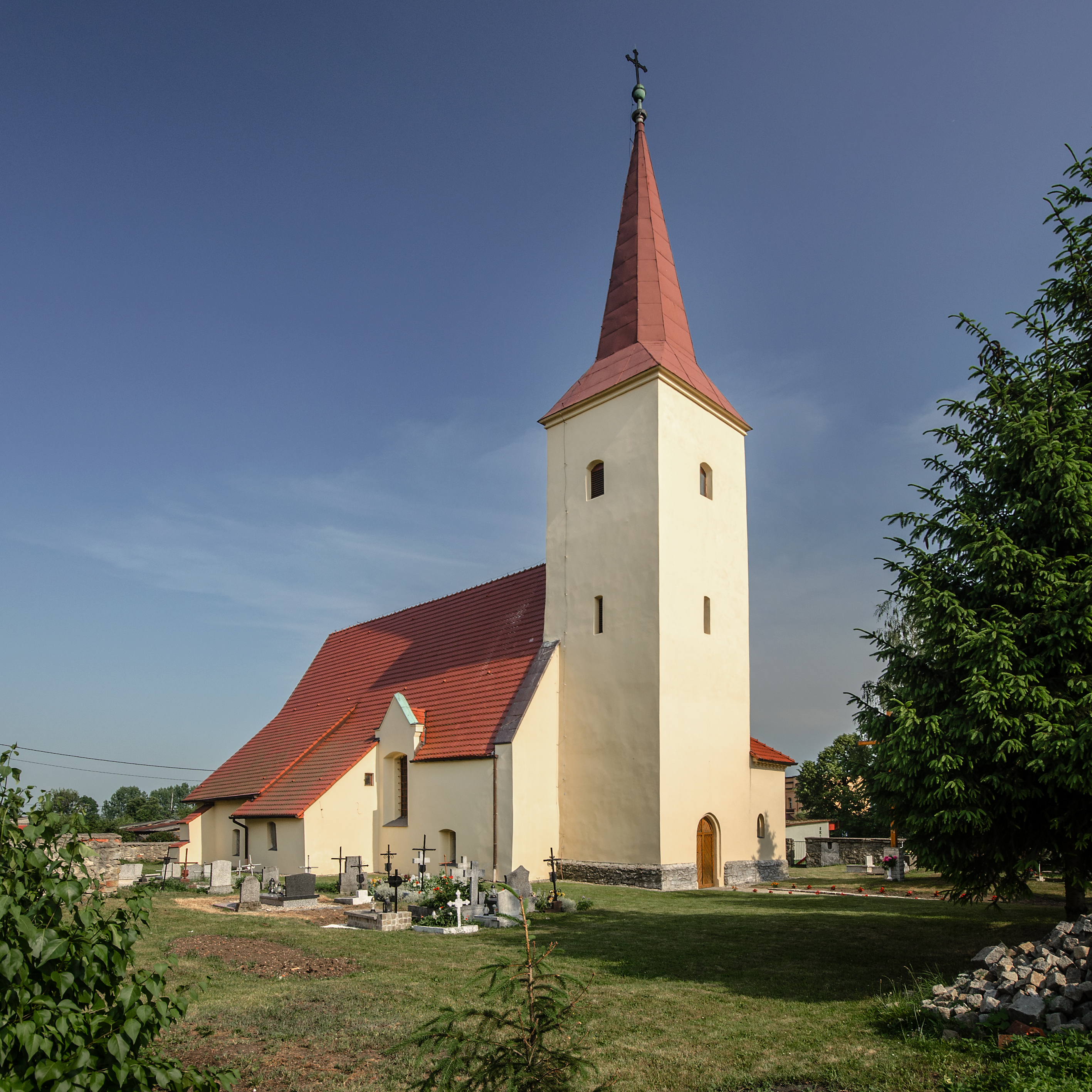 Przecławice, kościół par. p.w. św. Katarzyny, XV/XVI, 1869